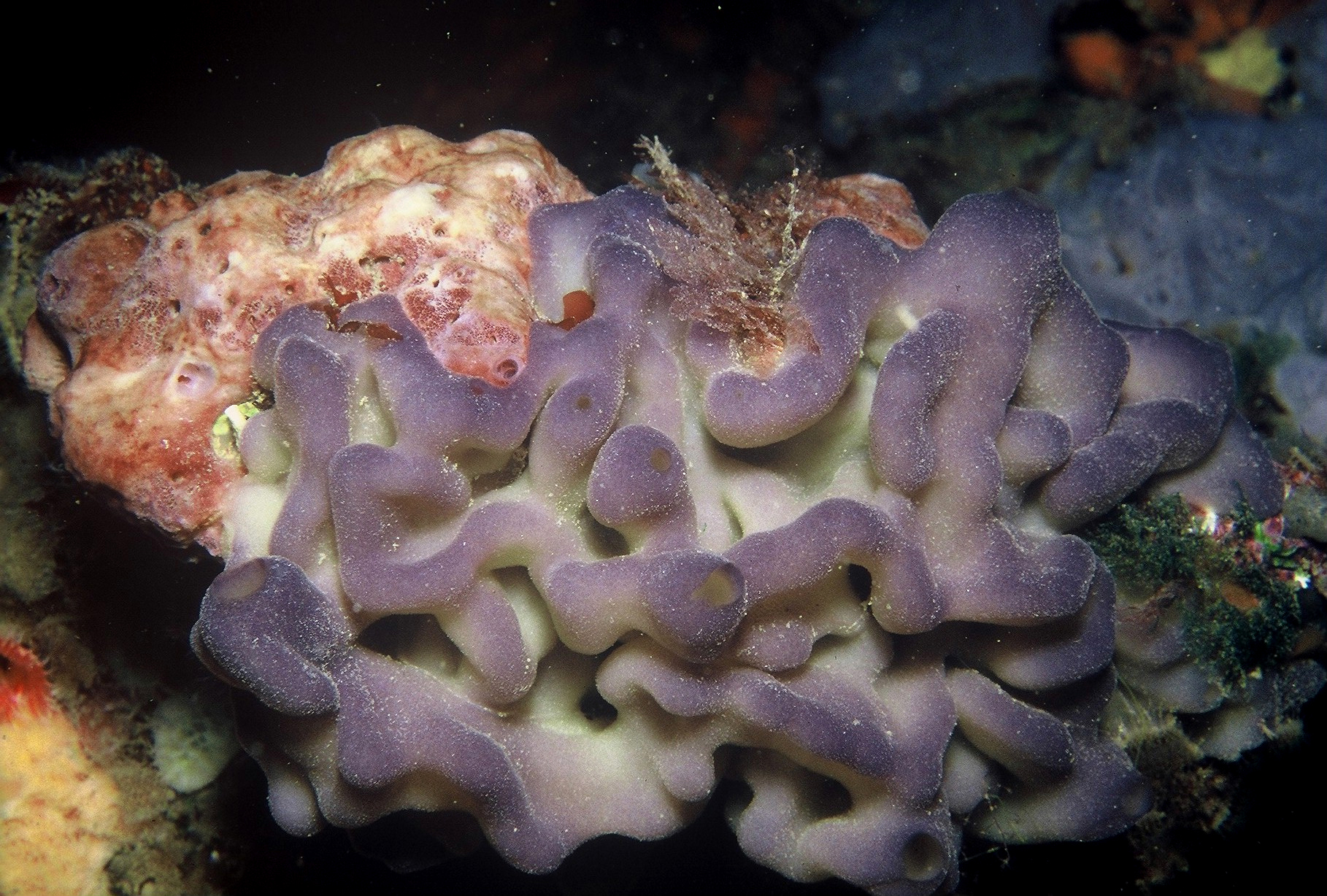 Oscarella lobularis. La couleur plus foncée est caractéristique des zones les plus exposées à la lumière - Banyuls-sur-Mer : 08/85